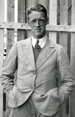 Olympische Spelen Los Angeles 1932. Jhr. G.L. Röell maakt deel uit van de Olympische roeiploeg, die Nederland op de Spelen van 1932 zal vertegenwoordigen.